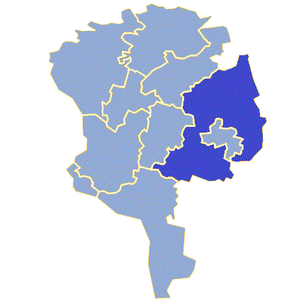 Powiat żarski - Gmina Żary